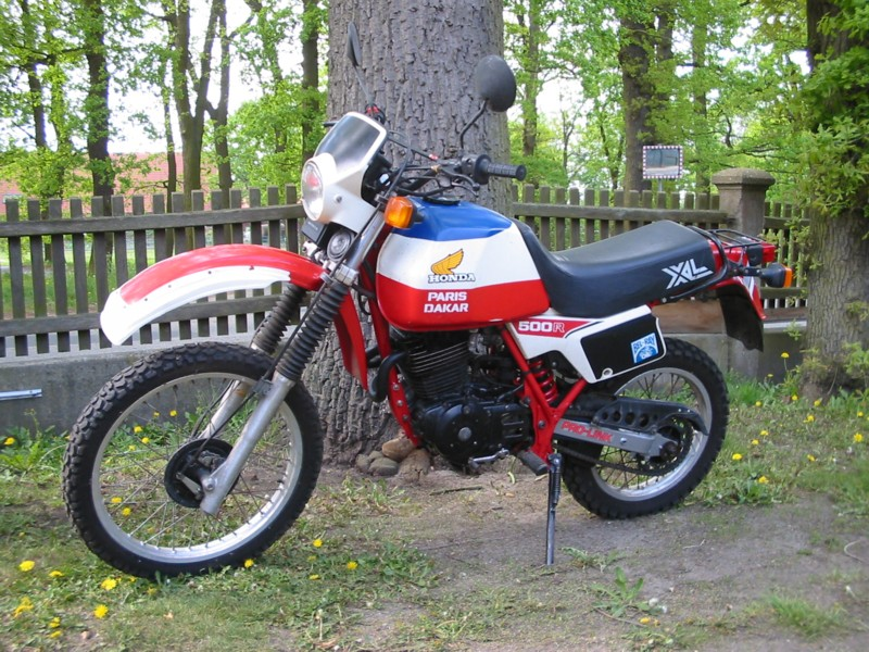 xl500 Paris-Dakar Ausführung